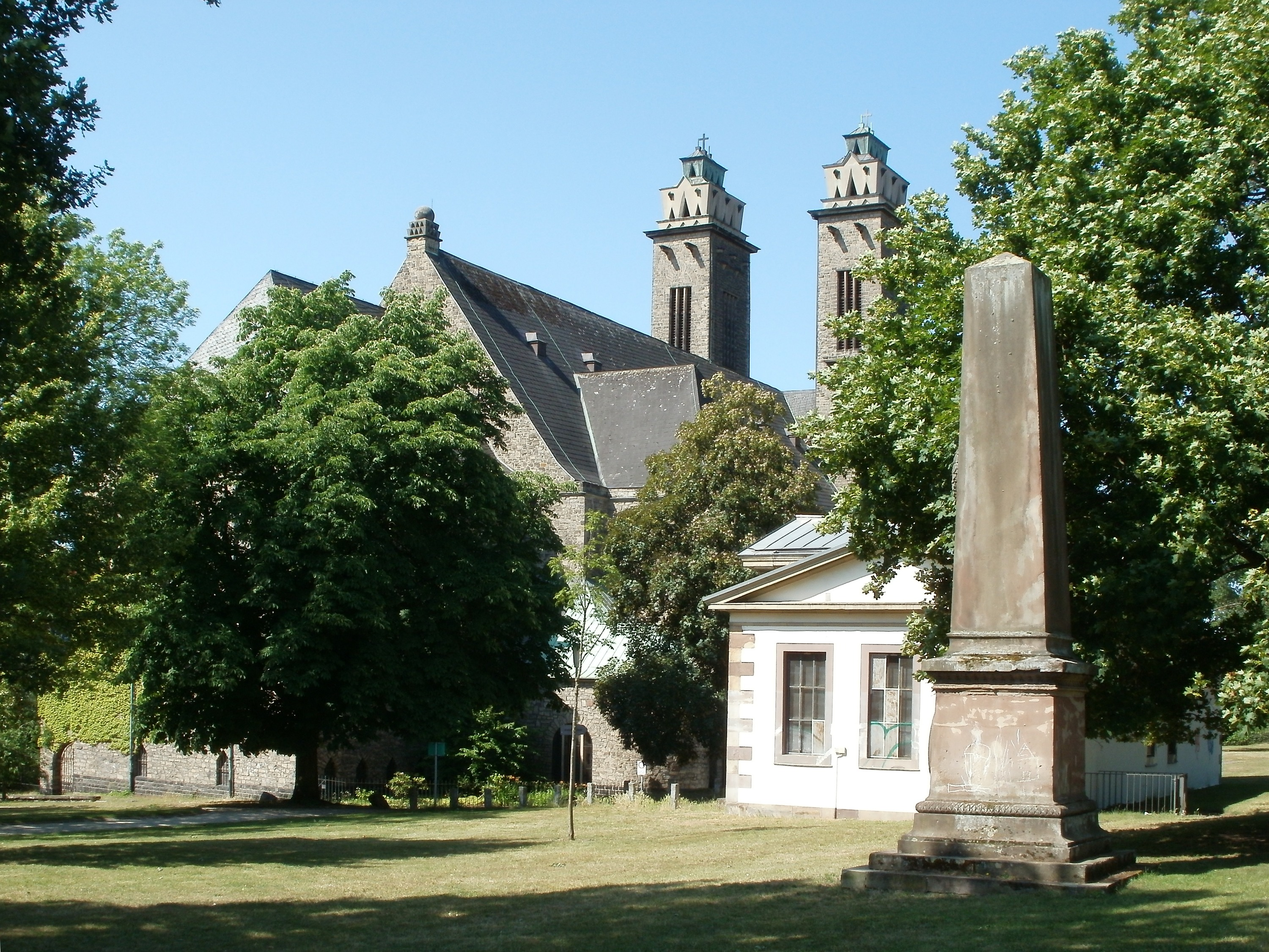 Echelmeyerpark (Saarbrücken) mit Denkmal, Friedhofskapelle und St. Michael